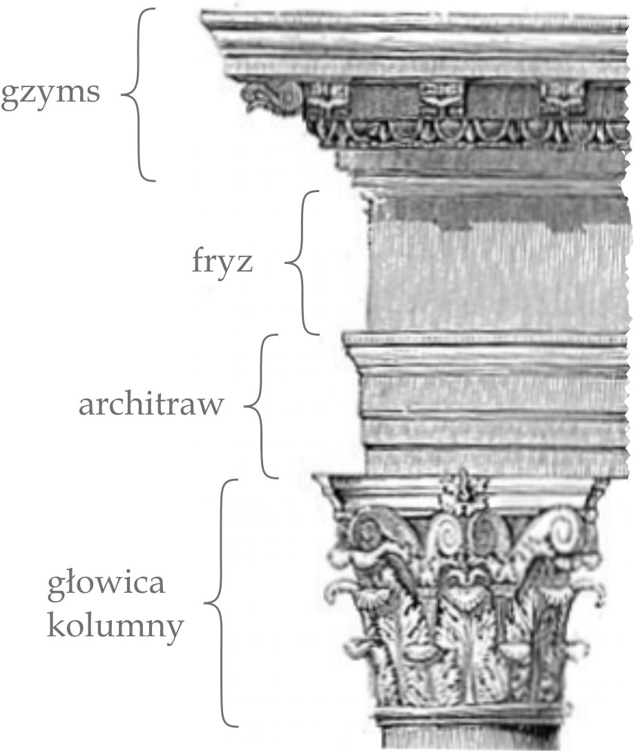 Belkowanie nad głowicą kolumny w porządku korynckim (z portyku rzymskiego Panteonu) Od dołu nad głowicą kolumny: – architraw – fryz – gzyms